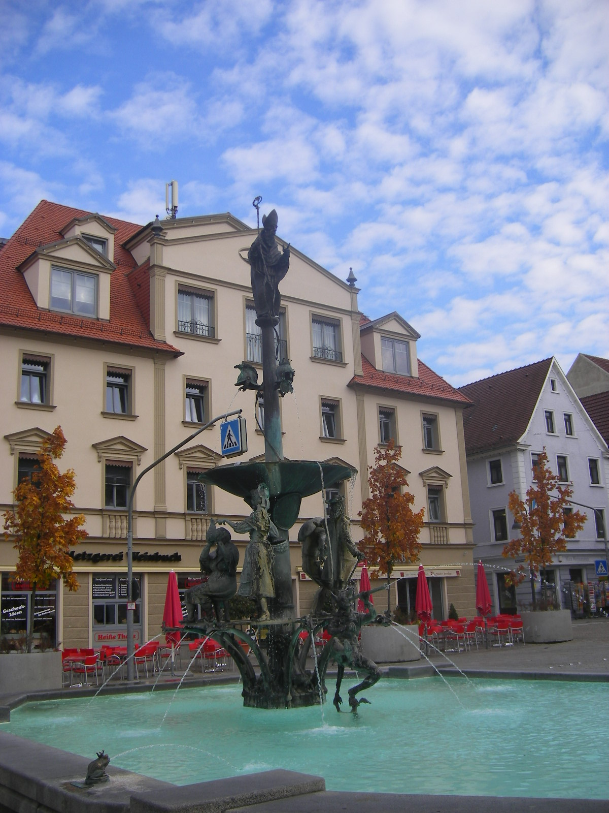 Ehingen